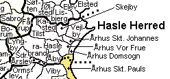 Sct. Pauls Sogn, Århus, Hasle Herred, Århus Amt